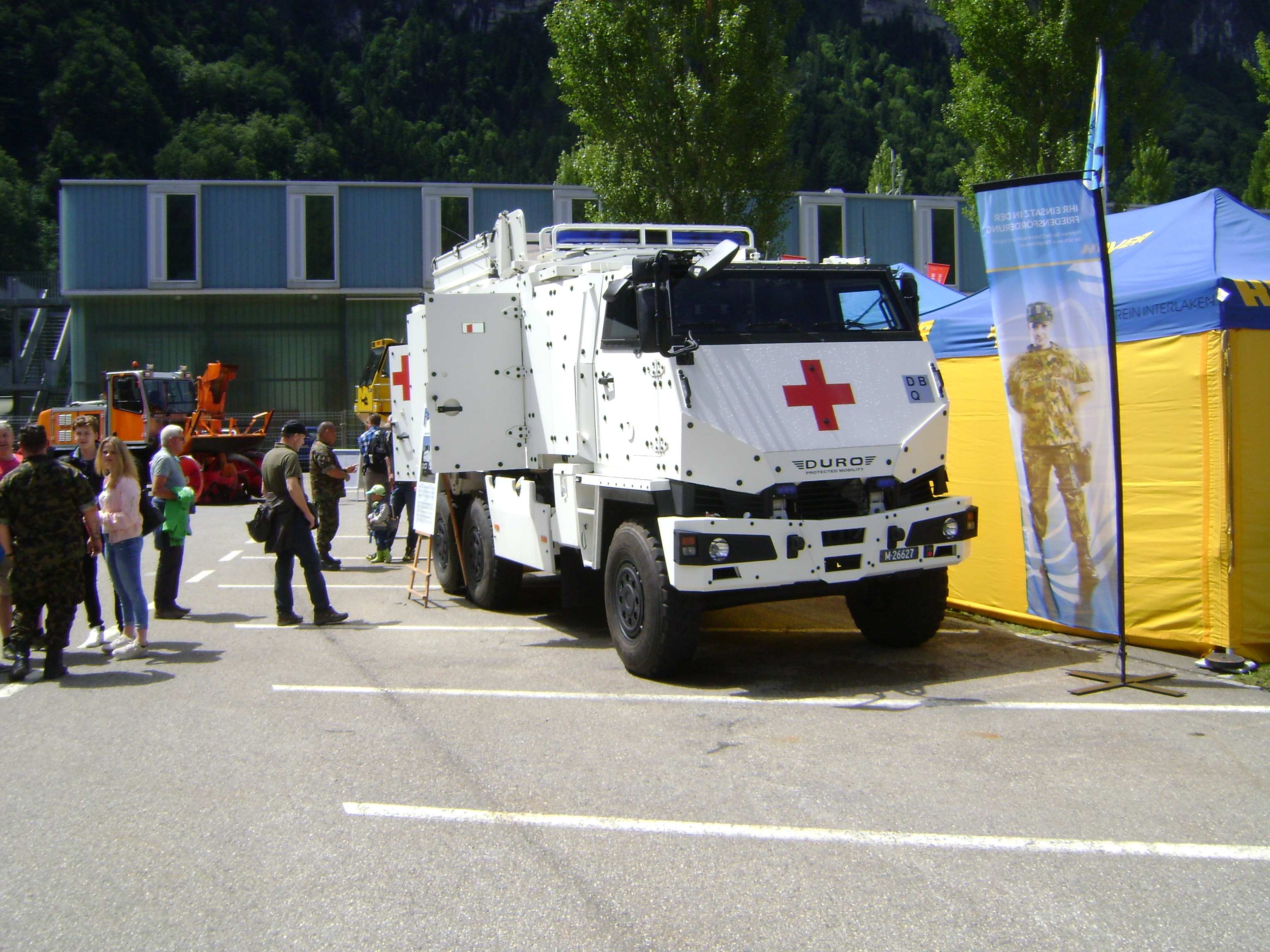 Mowag Ambulance Front